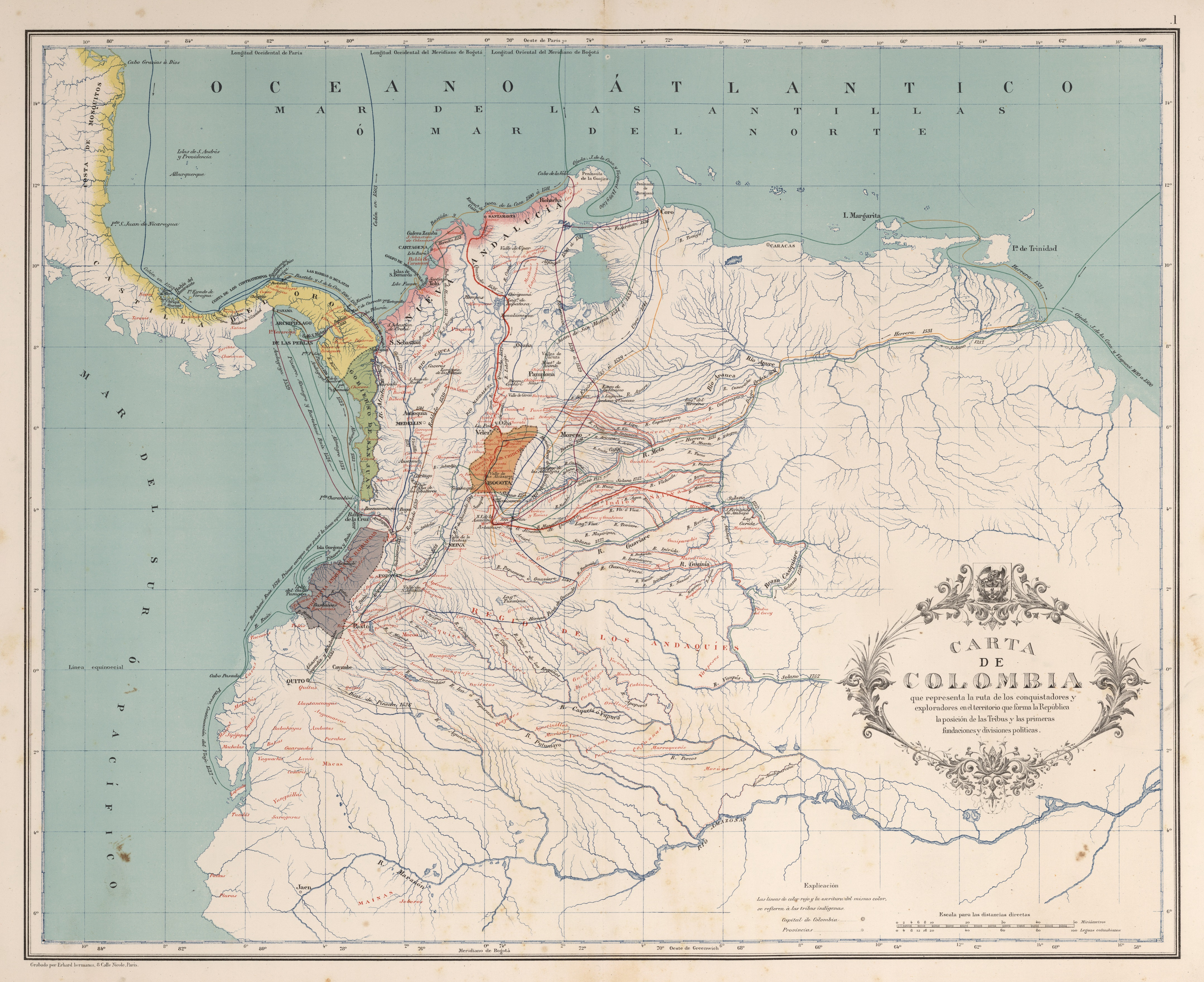 Carta de Colombia que representa las rutas de los conquistadores y exploradores del territorio que forma la República, la posición de tribus y las primeras fundaciones y divisiones políticas.. Carta I del Atlas geográfico e histórico de la República de Colombia, 1890.